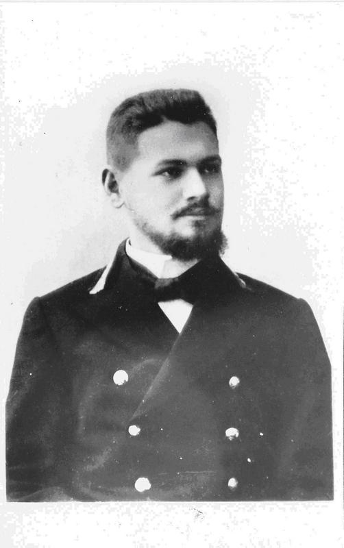 Лев Семёнович Берг - 1901 год